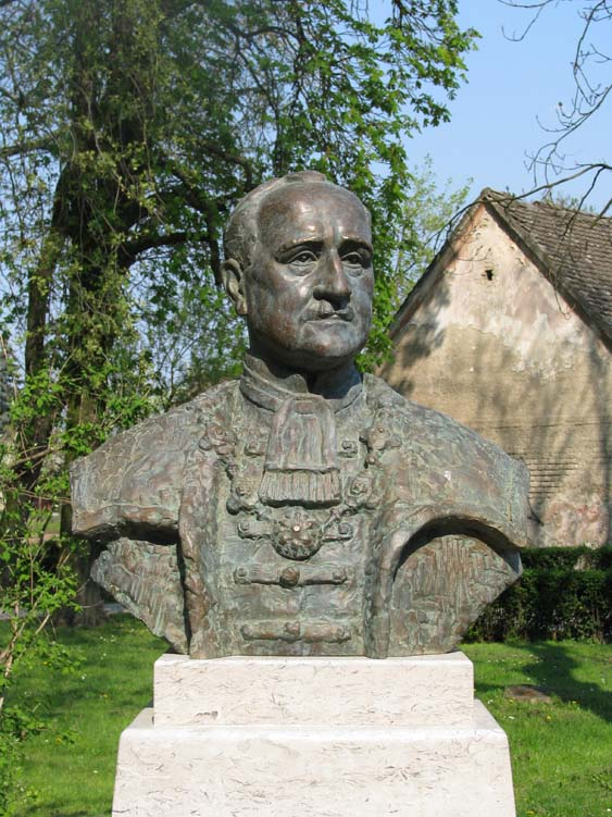 Bista Franjo pl. Lučić, hrvatski skladatelj i župan turopoljski (Velika Gorica)